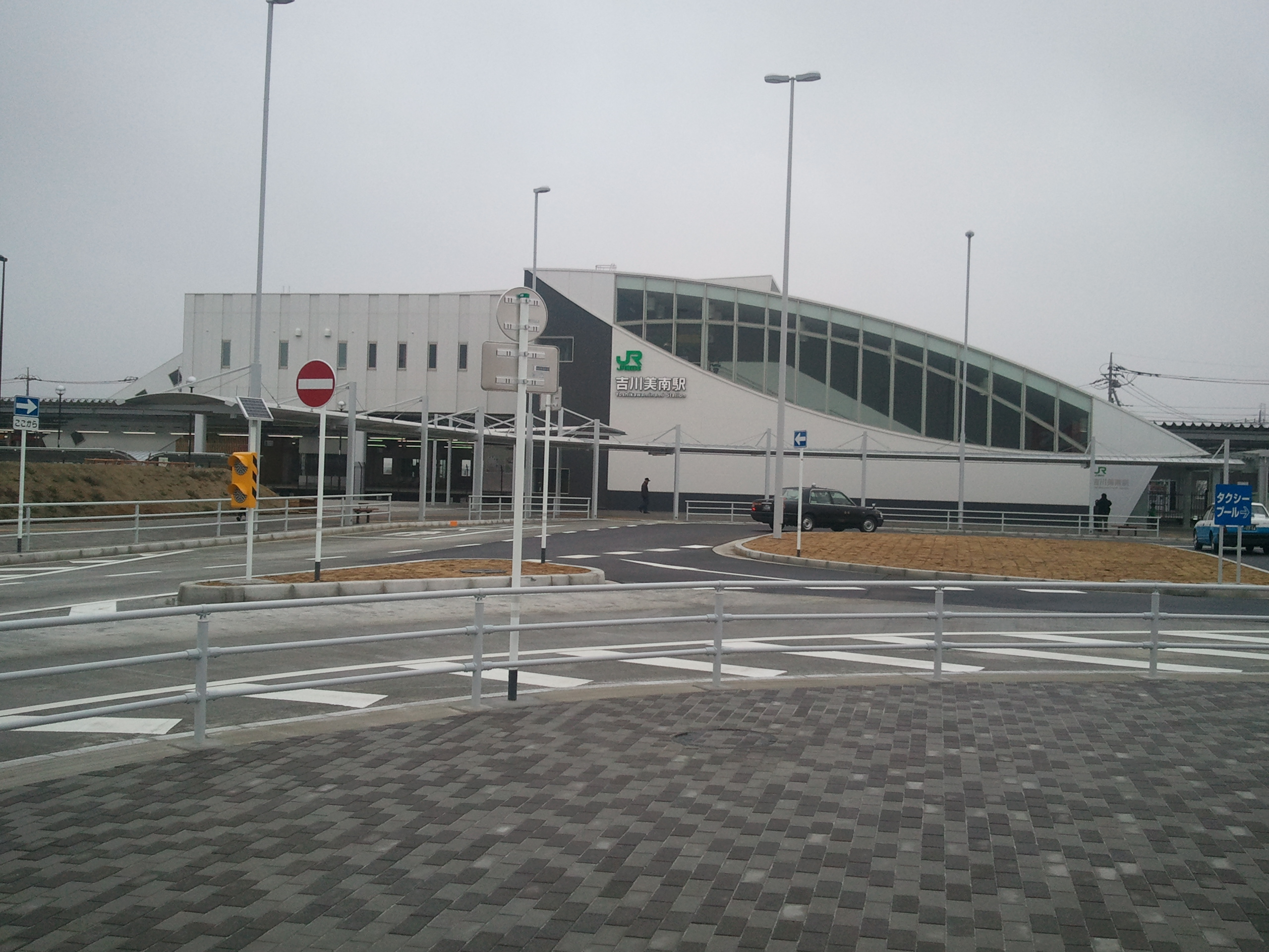 JR Yoshikawa-Minami station west, JR吉川美南駅西口